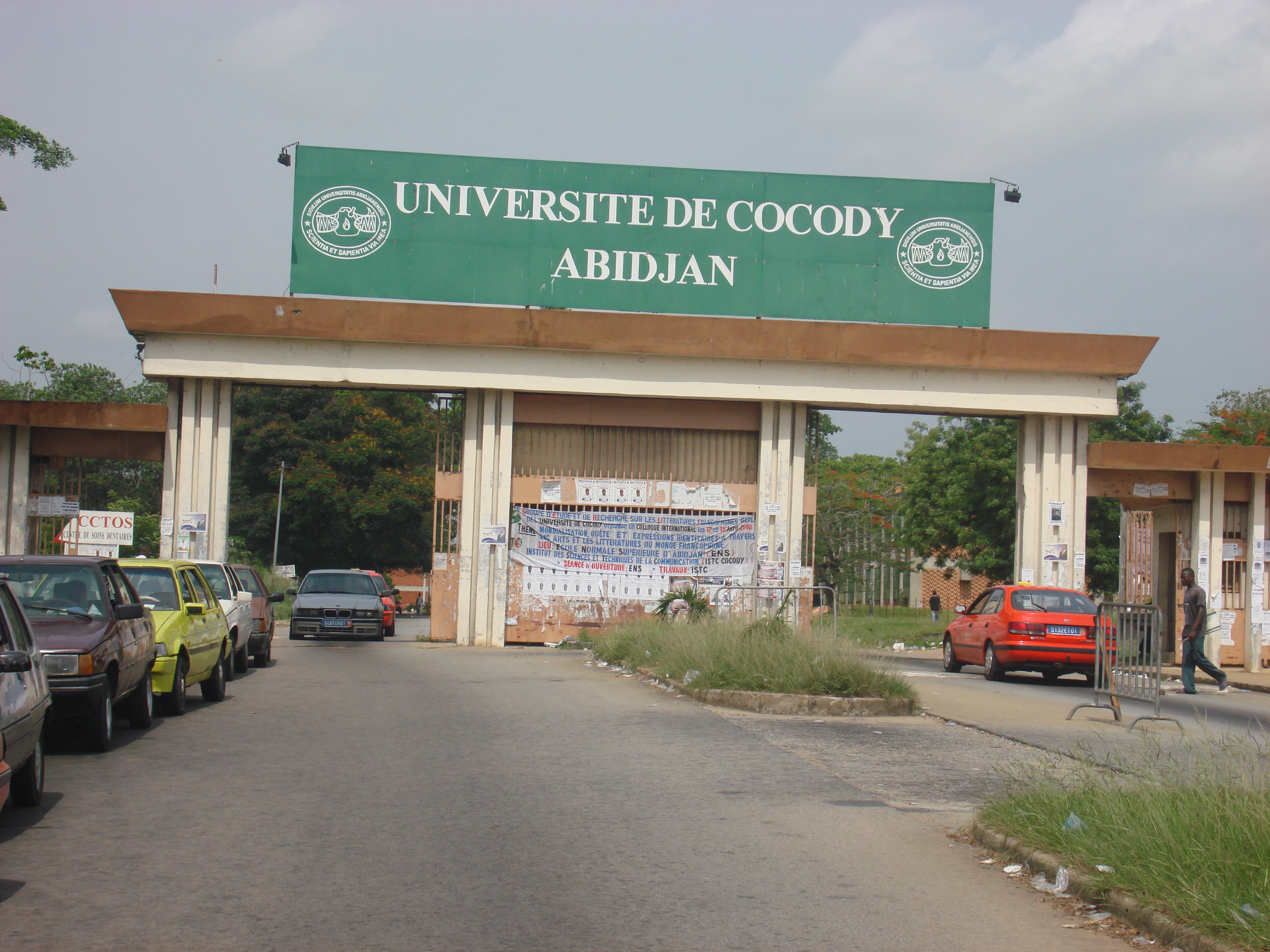 Entrée de l'Université de Cocody à Abidjan.